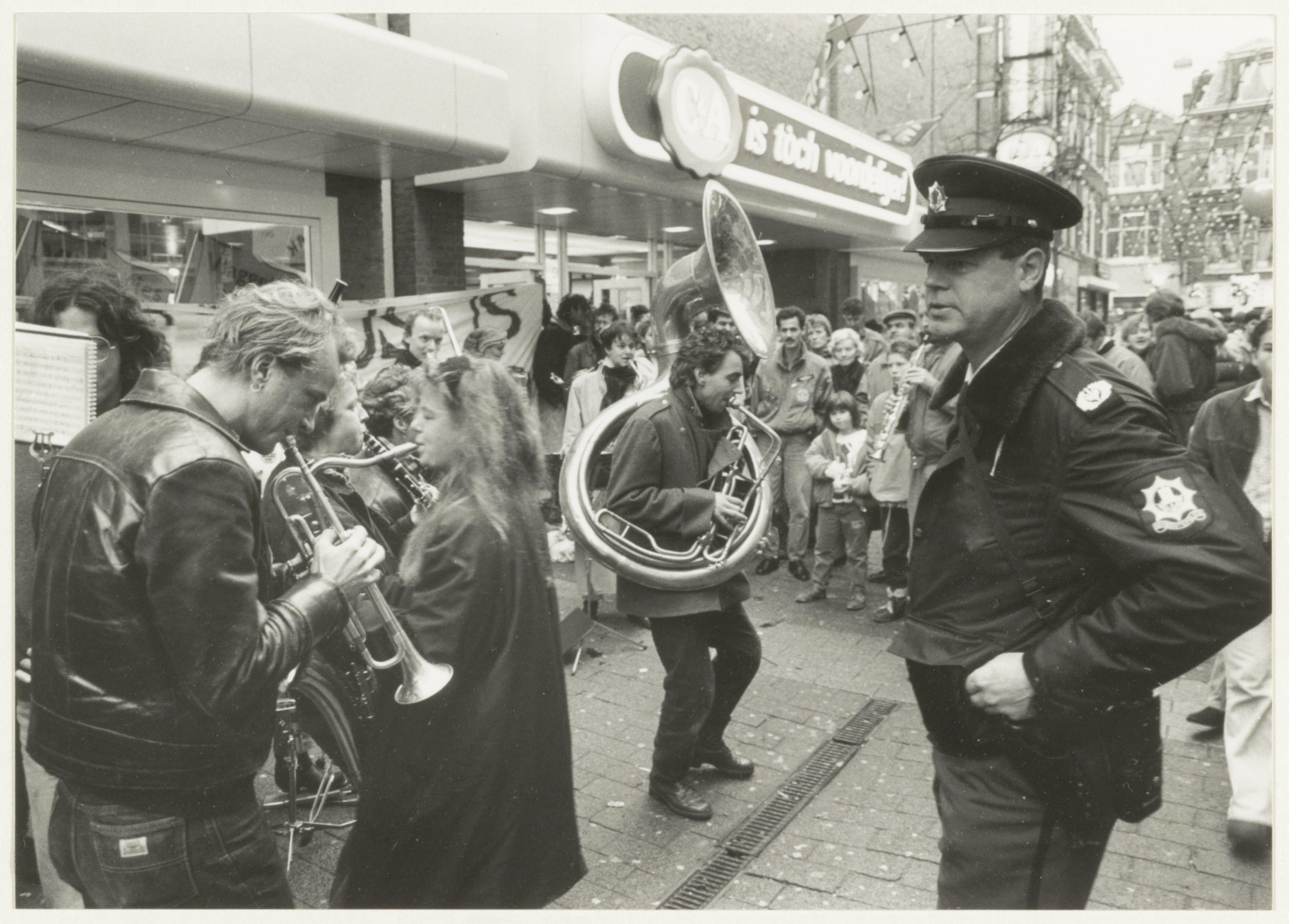 CollectieCollectie Fotoburo de BoerInventarisnummerNL-HlmNHA_54031927NL-HlmNHA_1478_33527KBeschrijving'Schone kleren-actie' in de Anegang. Het Haarlemse straatorkest verzorgt de muzikale begeleiding.FotonummerNL-HlmNHA_1478_2895DocumenttypeHistorieprenten, tekeningen en foto'sSoort vervaardigerFotograaf AnnotatiesD59.1 HD241290LandNederland ProvincieNoord-Holland GemeenteHaarlem PlaatsHaarlem StraatAnegang GeografischCentrum Begindatum12-1990Einddatum12-1990TechniekFoto TrefwoordenMuziekanten